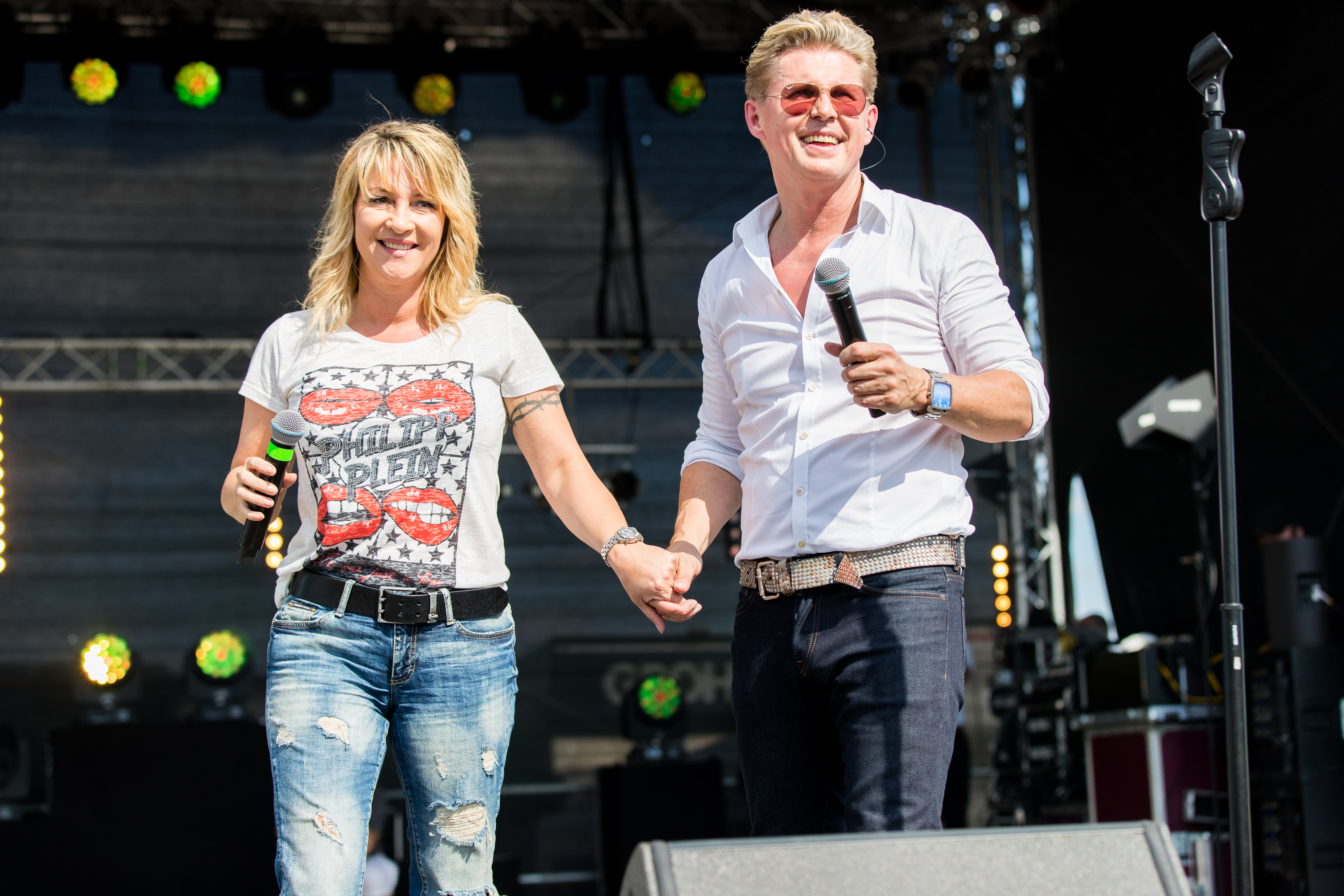 Markus during La Ola Mannheim at Maimarktgelände, Mannheim, Baden Württemberg, Germany on 2016-07-09, Photo: Sven Mandel